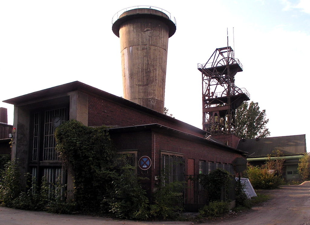 Grubenlüfter und Fördergerüst von Schacht 7 der Zeche General Blumenthal, Recklinghausen. Mine fan and winding tower of shaft 7 of the abandoned coal mine General Blumenthal, Recklinghausen. See where this picture was taken. [?]